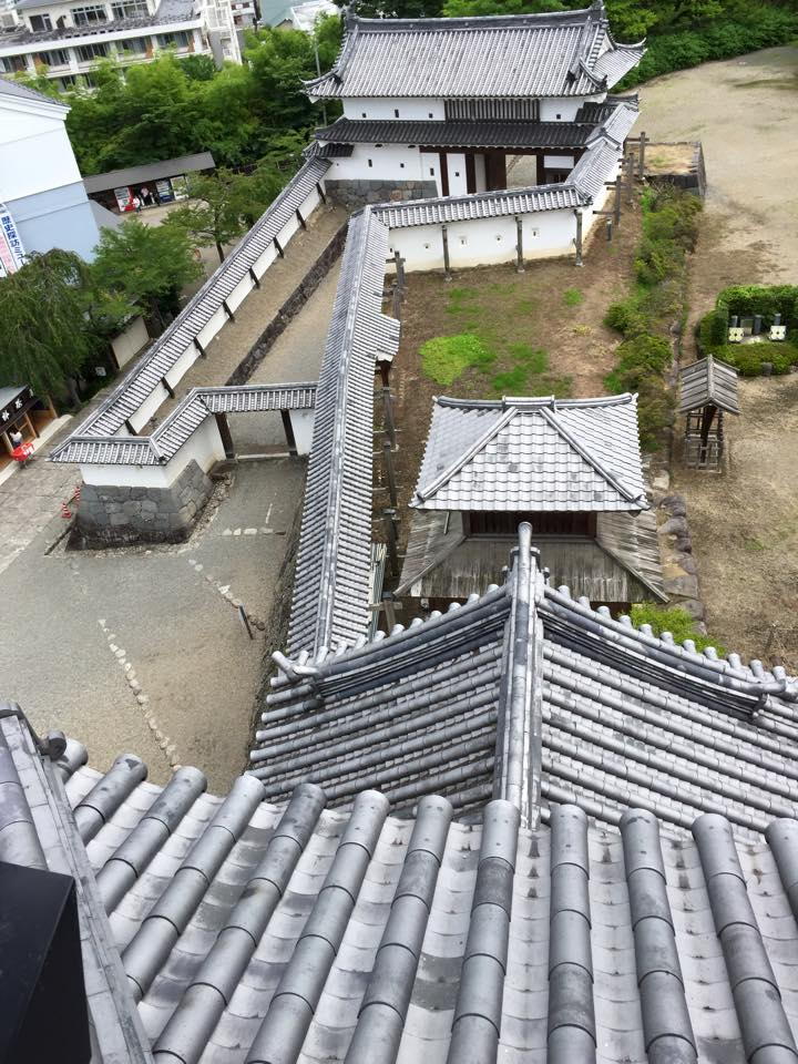 白石城（復元）の天守閣からの眺め 2015年